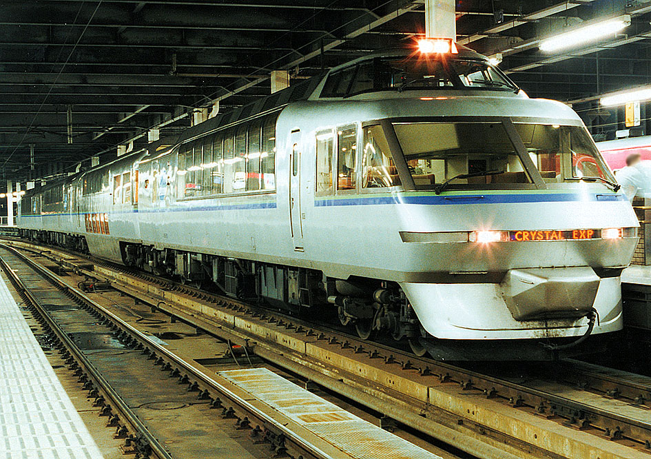 JR北海道 キハ183系クリスタルエクスプレストマム＆サホロ（4両）